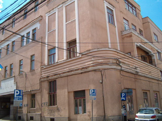 Academia de Muzică "Gheorghe Dima" Cluj-Napoca